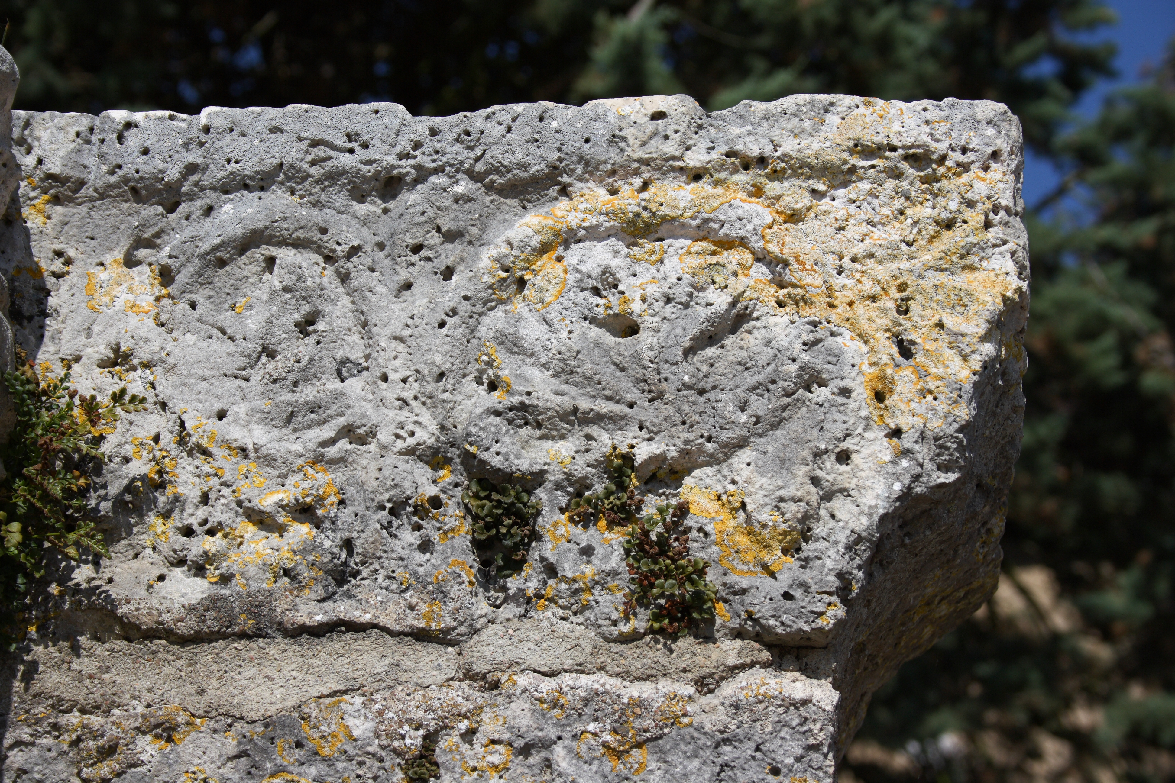 Katholische Pfarrkirche Saint-Clair-Saint-Léger in Souppes-sur-Loing im Département Seine-et-Marne in der Region Île-de-France (Frankreich), Rest eines Portals, Ende 11./Anfang 12. Jahrhundert, romanischer Kämpfer mit kreisförmigen Ornamenten